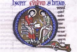 Bible dite des Comtes de Champagne, provenant de la collégiale Saint-Etienne de Troyes